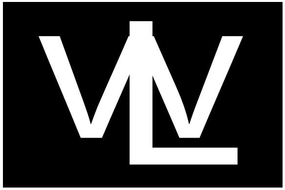 Flag of "Freischar Schill", 1927